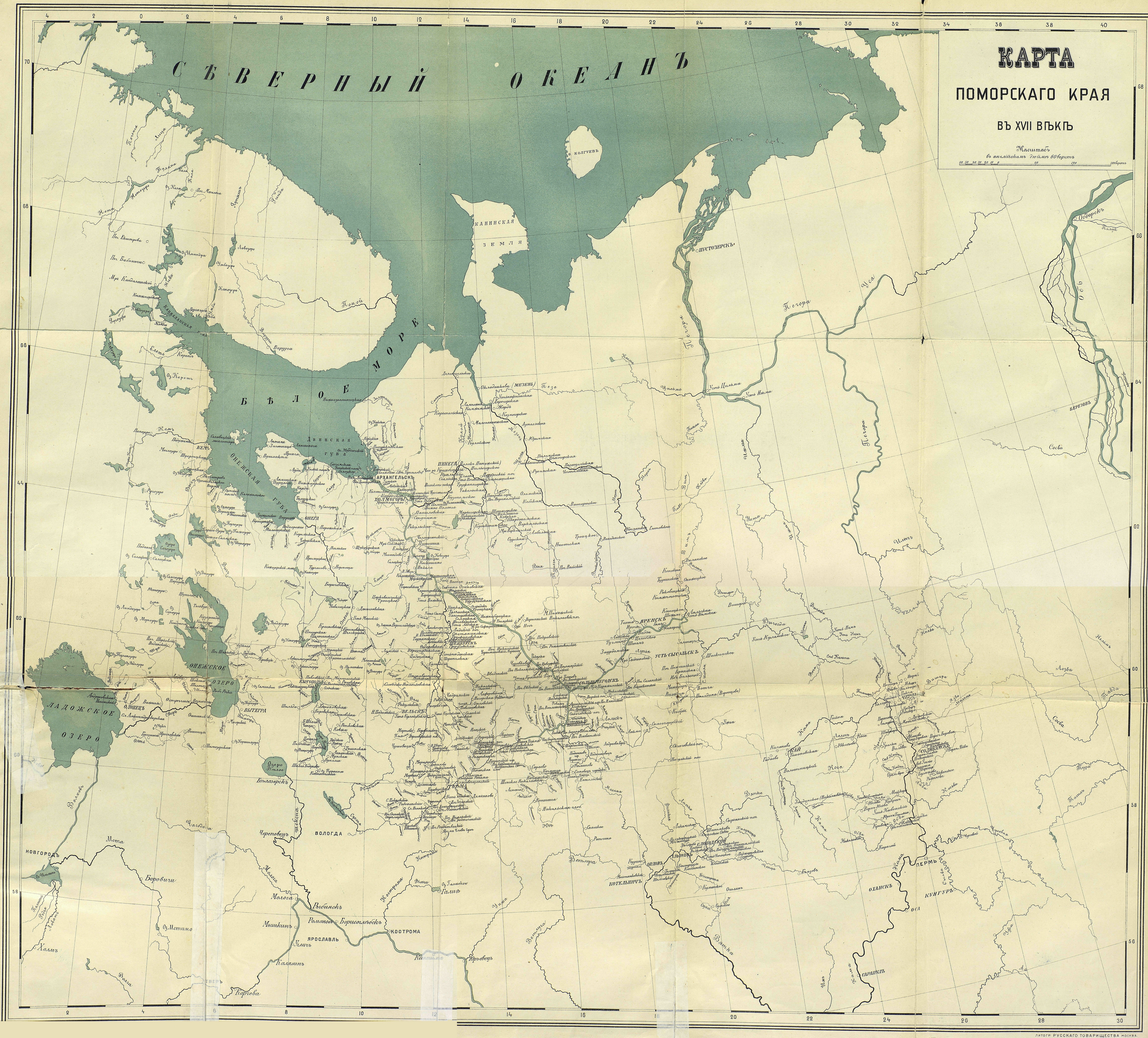 Карта Поморского края в XVII веке. Богословский М.М. Земское самоуправление на Русском Севере в XVII в. Том 1. - Москва, 1909